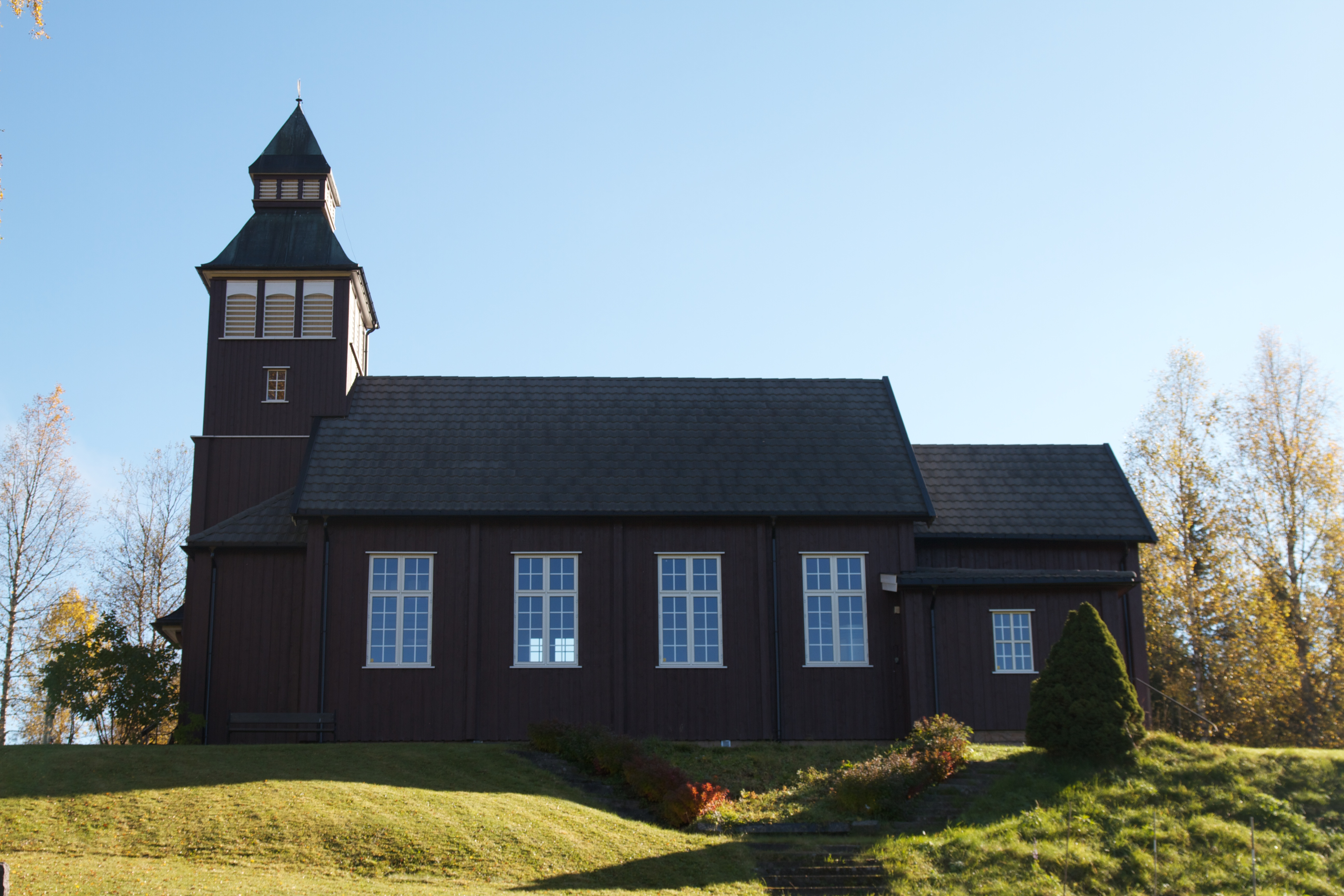 Grua kirke.